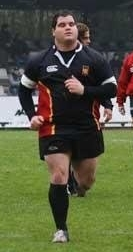 Sacha Vanden Berghen, joueur de rugby à XV du RSCA-Rugby